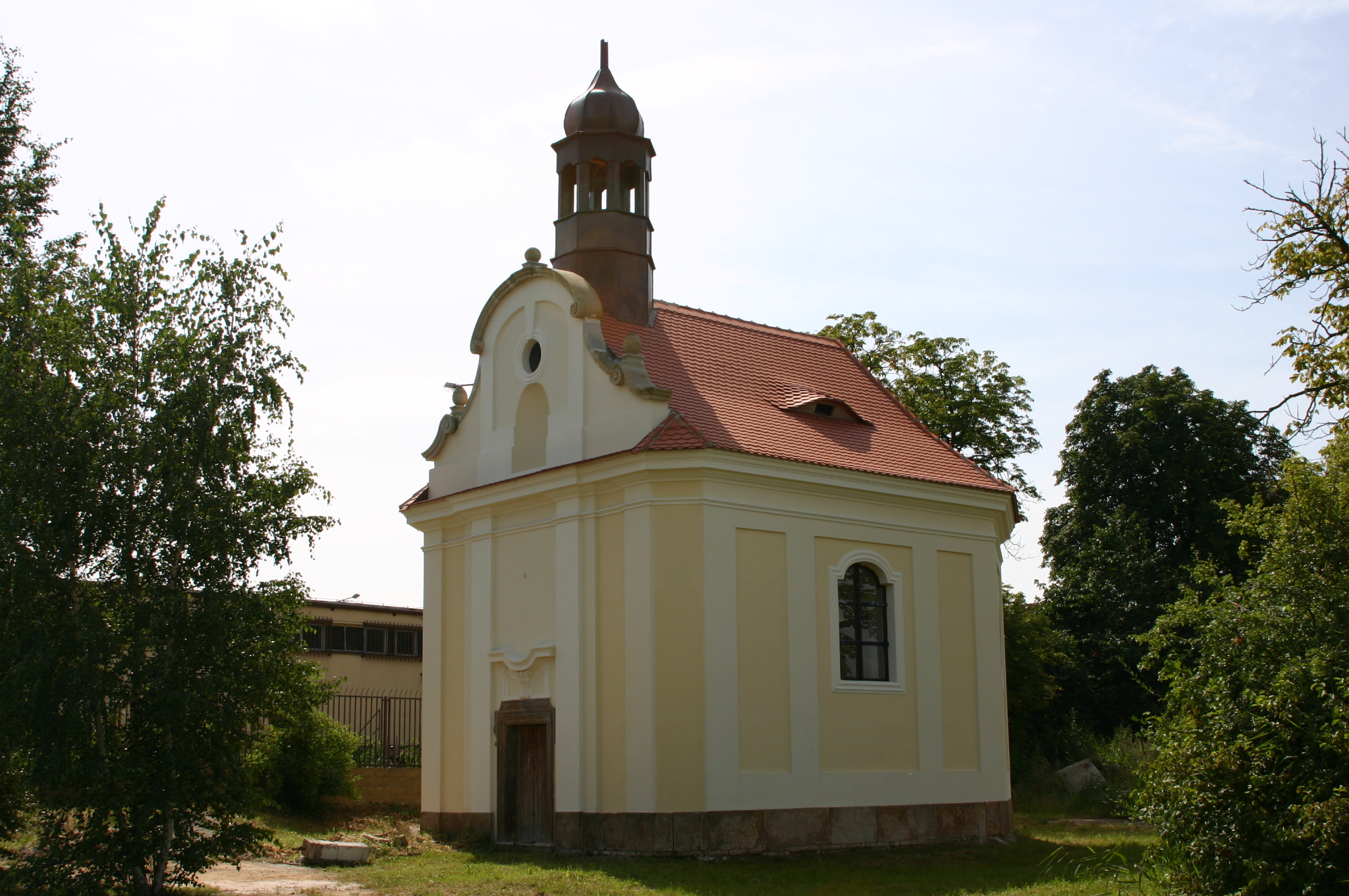 Osada Zaječice v okrese Most (kaple)